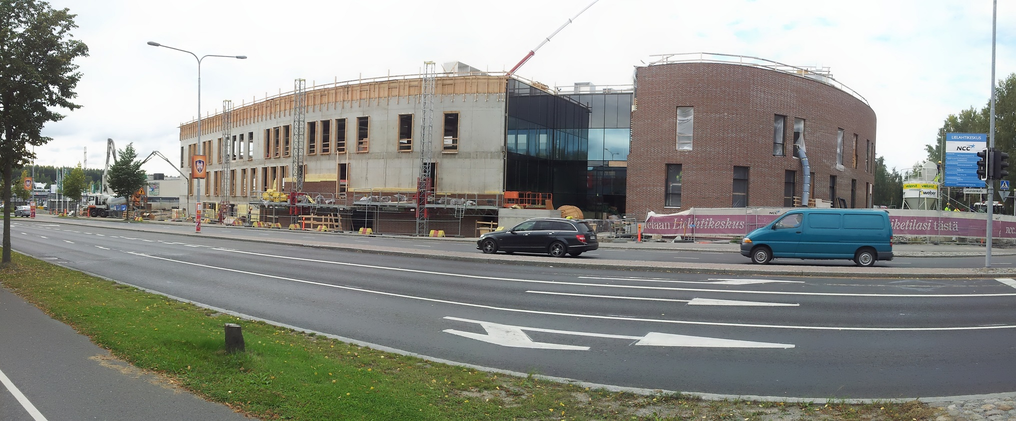 Rakenteilla oleva Lielahtikeskus 10.9.2013